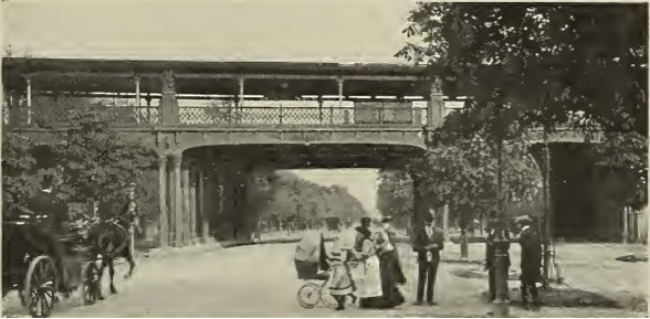 Wien - Brücke. Details siehe Dateiname.